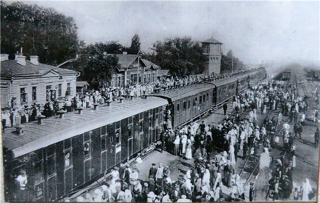 Вокзальная площадь станции г. Дружковка. Возвращение солдат с фронтов империалистической войны